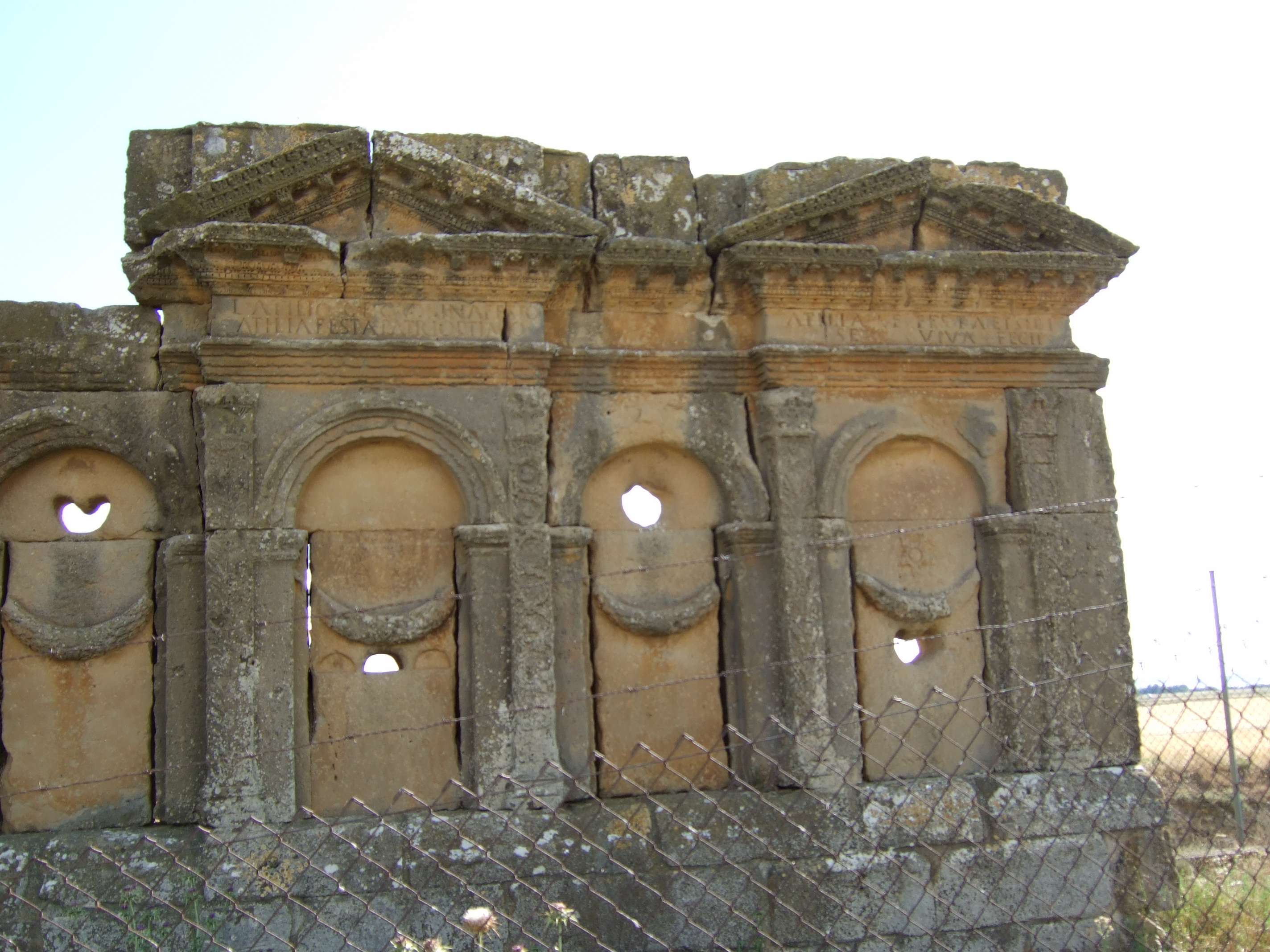 Sádaba - Mausoleo de los Atilios CIL II 2973